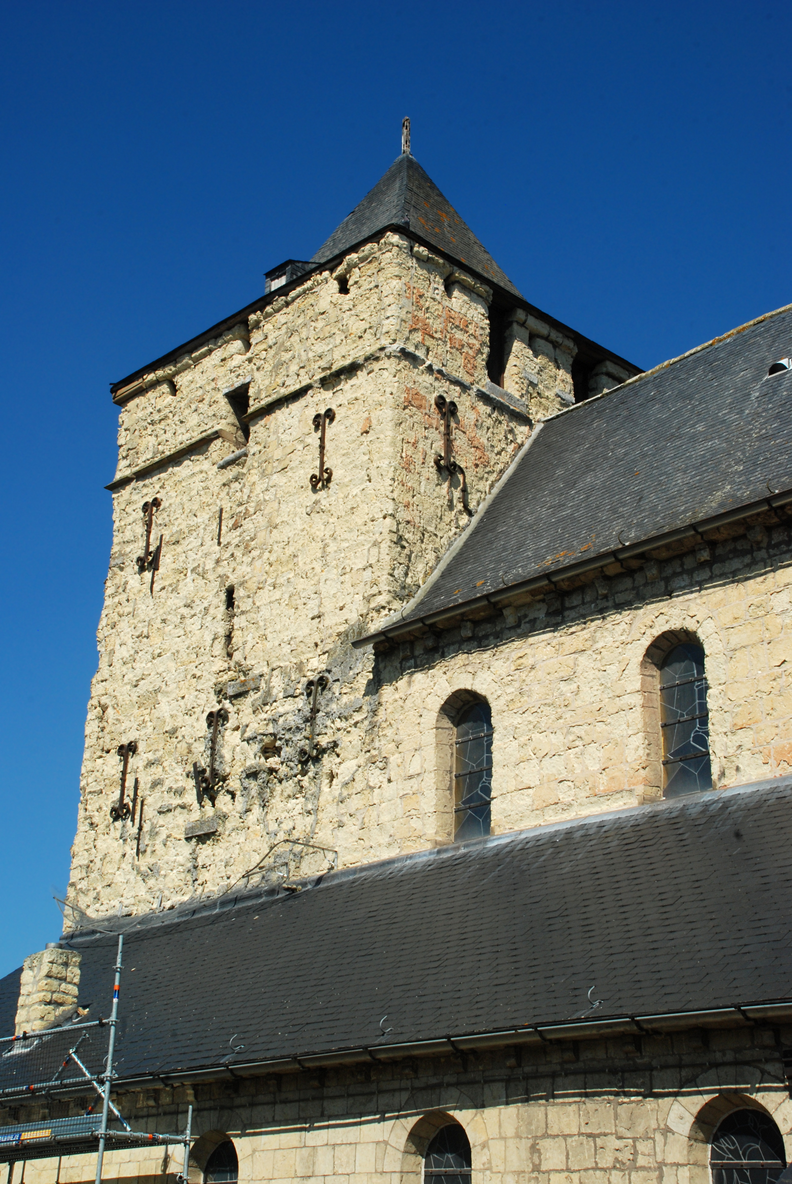 Belgique - Brabant wallon - Hélécine - Neerheylissem - Eglise Saint-Sulpice